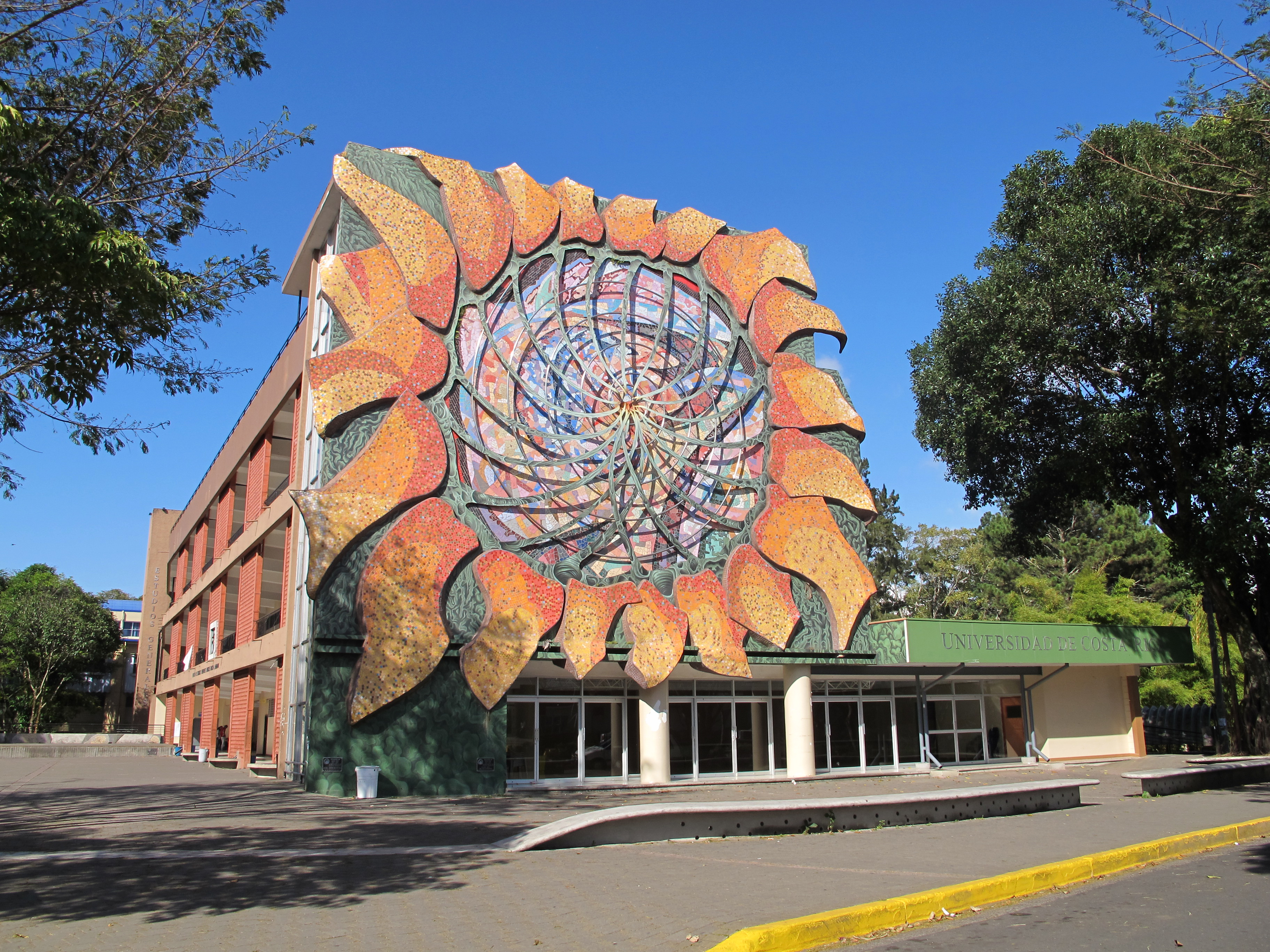 Bygninga til Escuela de Estudios Generales i Ciudad Universitaria Rodrigo Facio, Universidad de Costa Rica, i San Pedro de Montes de Oca i Costa Rica